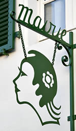 Enseigne de la mairie de La Flotte en Ré Photo issue de ma banque d'images personnelle Pep.per 29 mai 2006 à 23:48 (CEST)